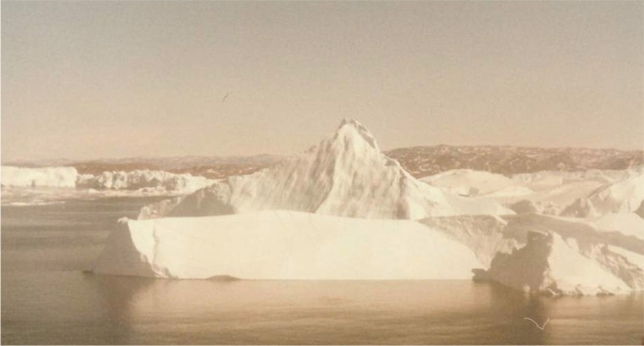 Iceberg of Aasiaat (Egedsminde) in Disko Bay Photo by Jan Kronsell